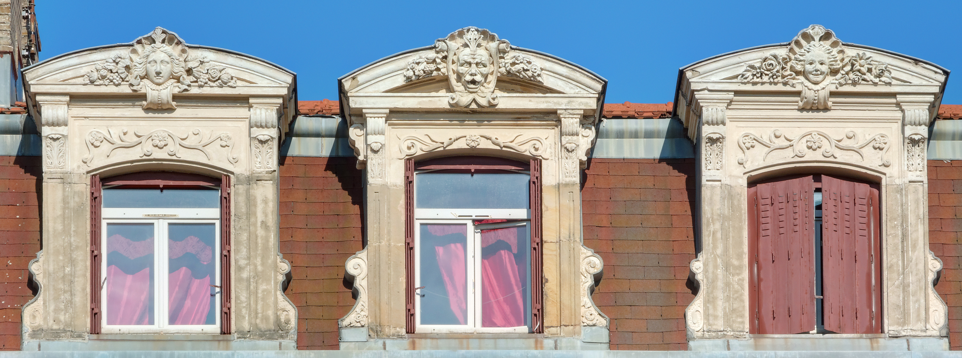 This image was uploaded as part of L'Été des villes 2015. Fenêtres avec mascarons, à Belfort.